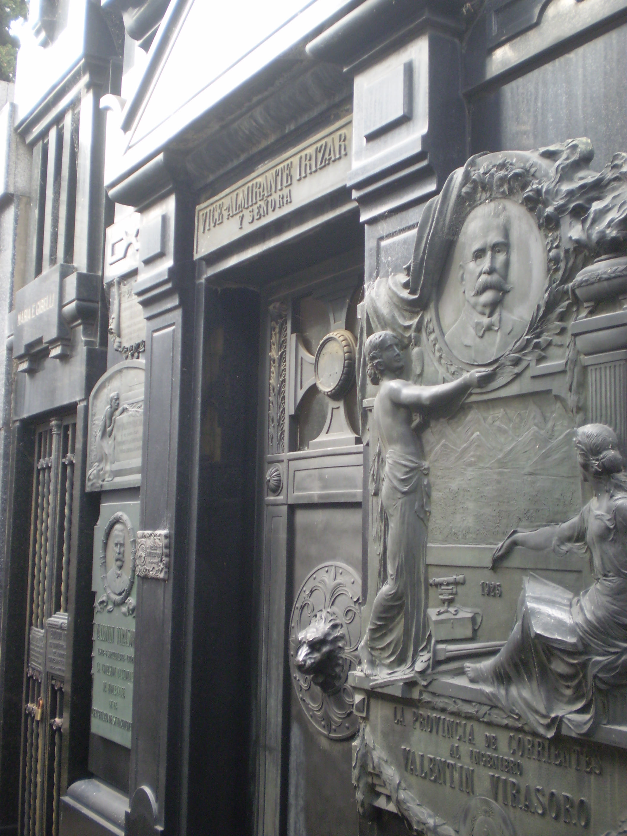 Bóveda del Almirante Irizar, descansan aquí además los restos del ingeniero Valentín Virasoro, Cementerio de la Recoleta, Buenos Aires.